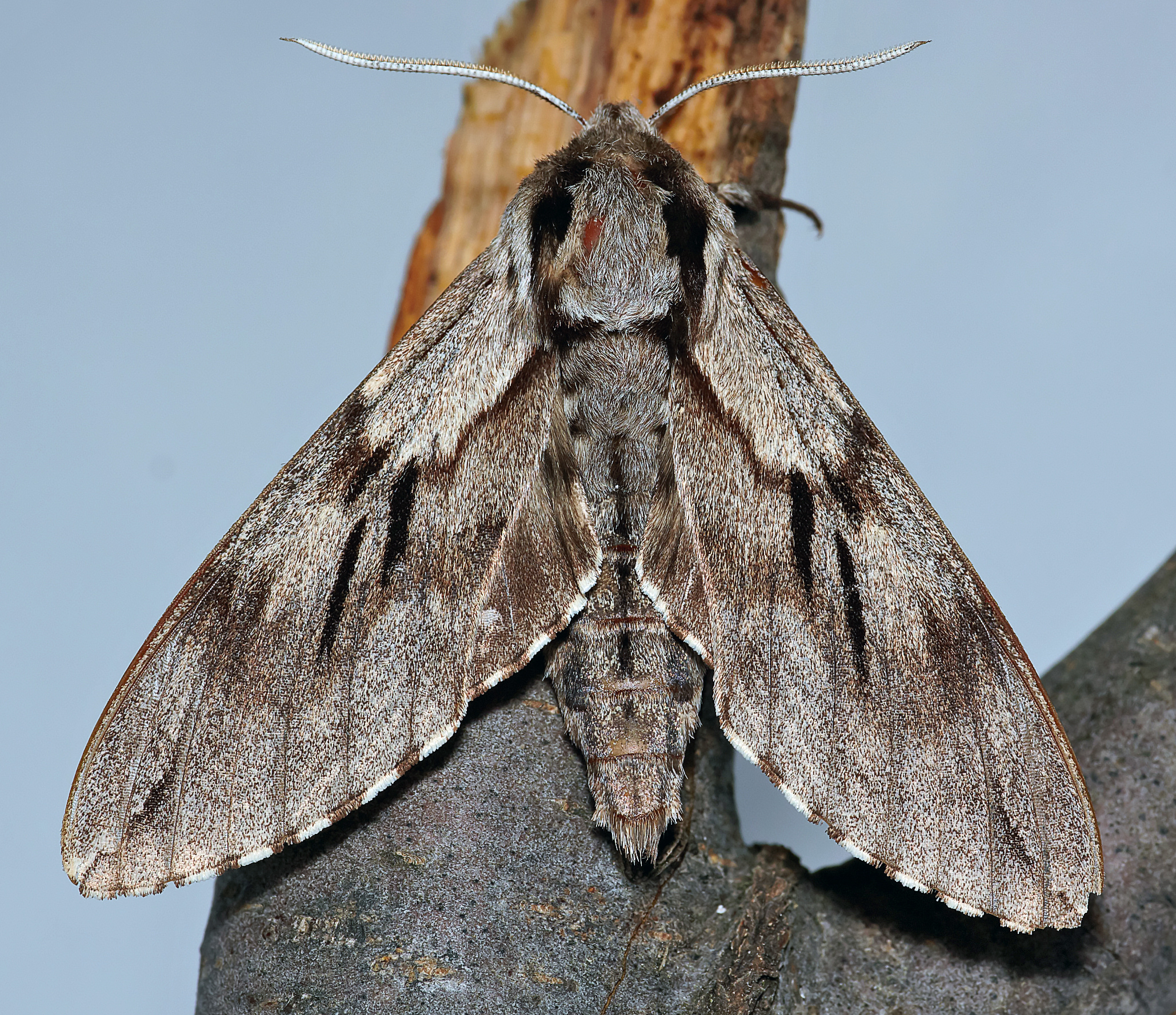 Sphinx pinastri